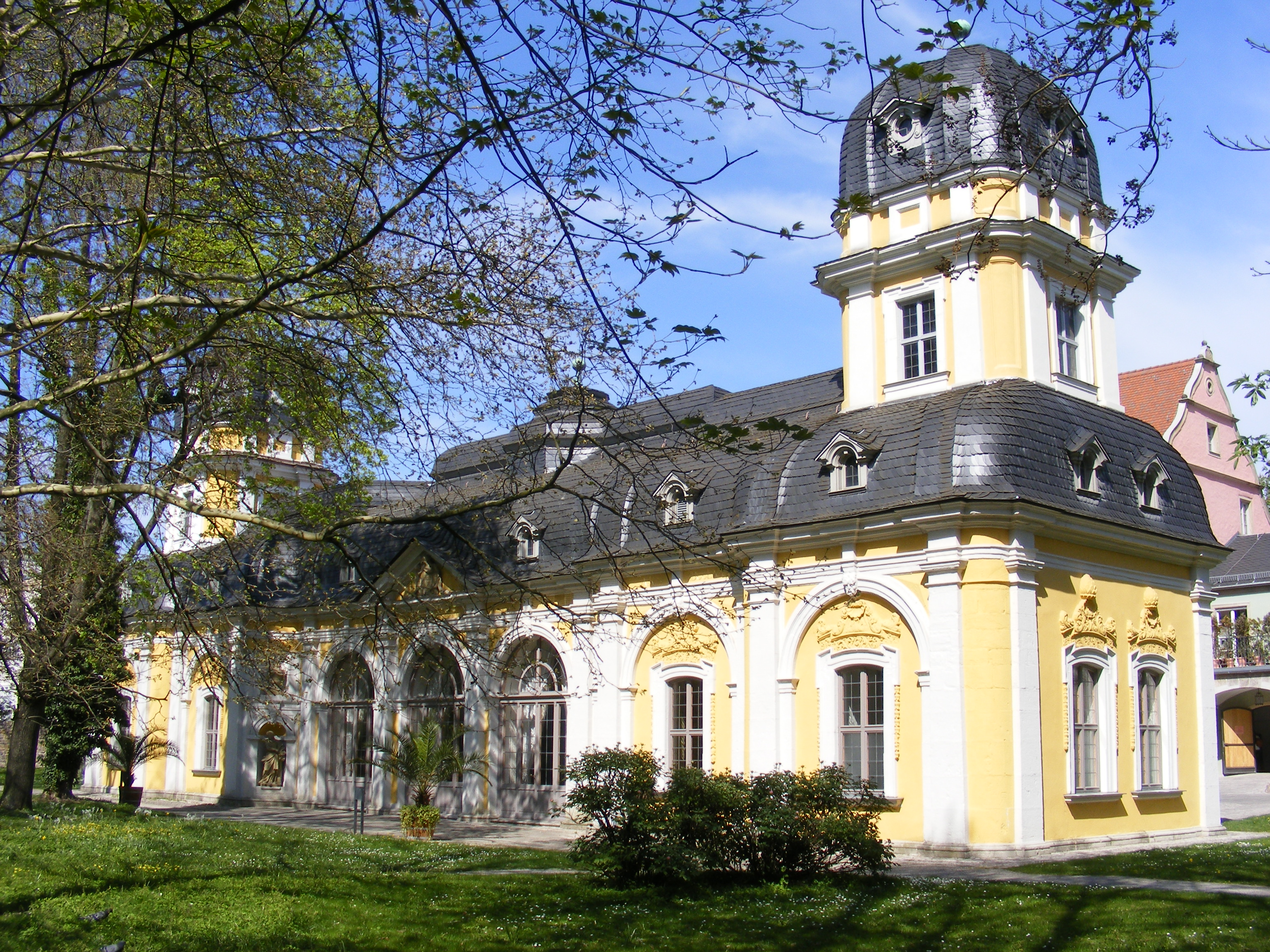 Würzburg - Gartenpavillon des Juliusspitals, Südwestfassade.